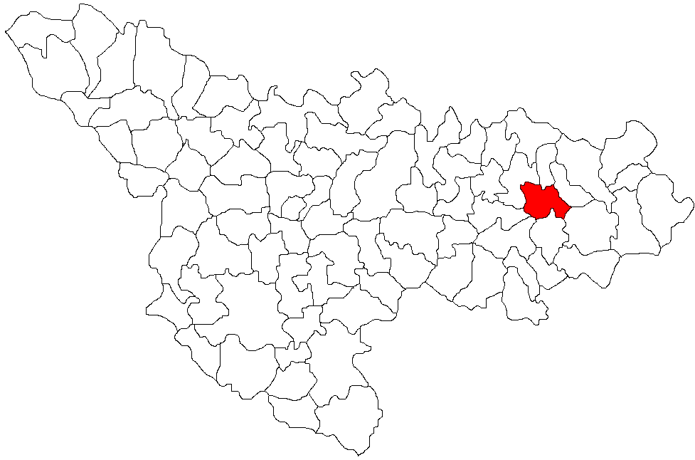 Categorie:Hărţi ale judeţului Timiş